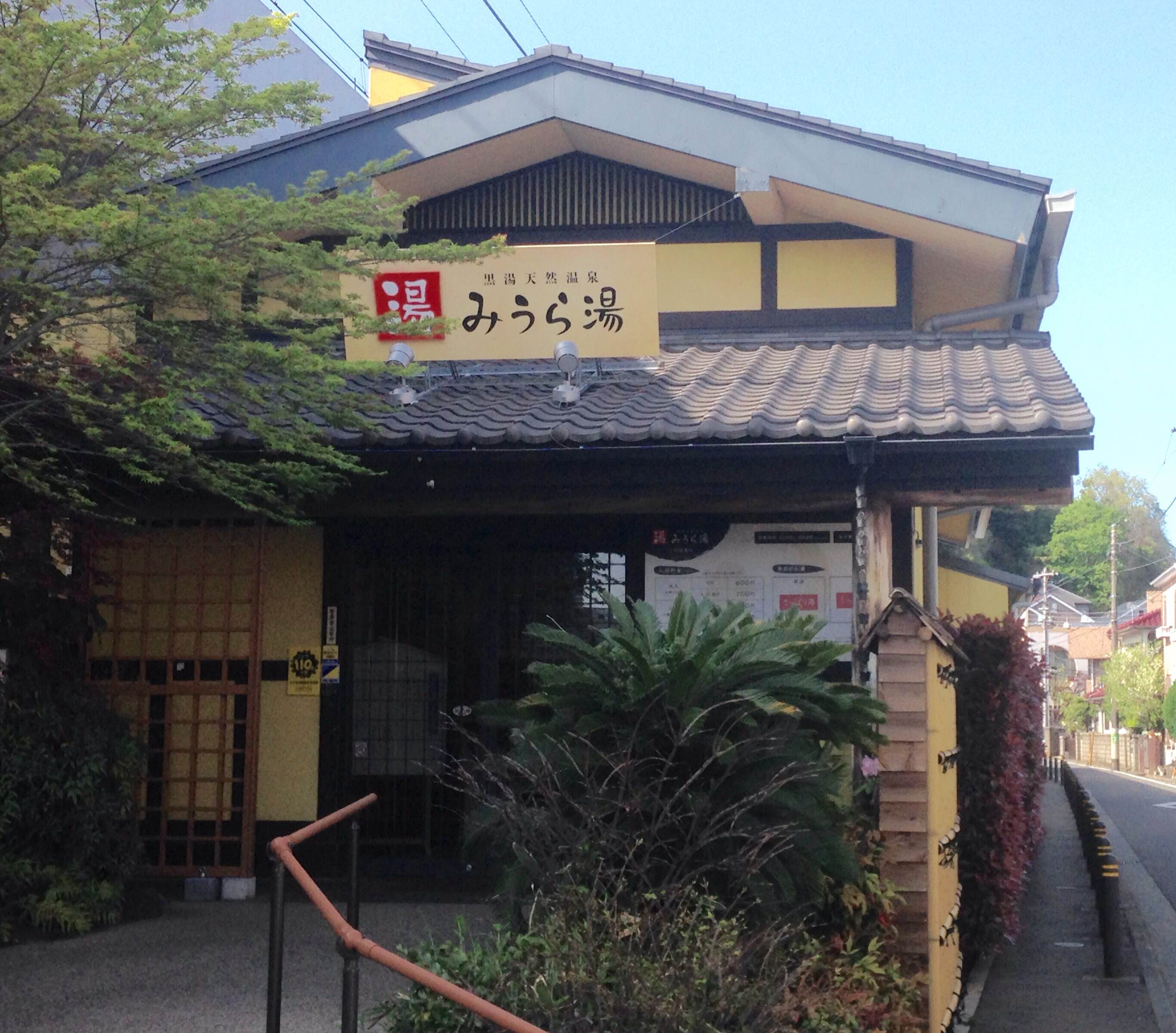 2016年4月1日にリニューアルオープンした横浜市南区のスーパー銭湯「黒湯天然温泉 みうら湯」。